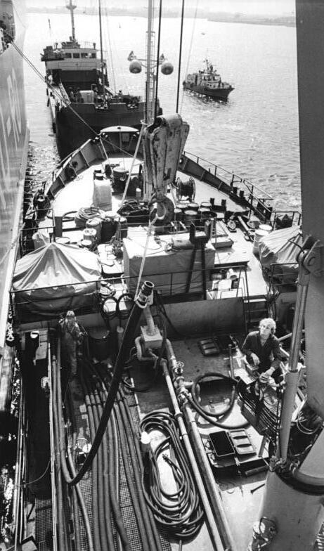 Rostock, Hafen, Tankreinigungsschiff ADN-ZB Sindermann 30.8.89 Rostock: Tankreinigungsschiff- Einen Reinigungsservice besonderer Art leistet die Besatzung des Tankreinigungsschiffes "Molon II" der Rostocker Bagger-, Bugsier- und Bergungsreederei. Mit Hilfe moderner Entsorgungsanlagen befreit sie die Schiffstanks von Altöl und Gasen. Die nötigen Schlauchleitungen werden hydraulisch auf die erforderliche Schiffshöhe gebracht. - Siehe auch 1989-0830-1N und 2N.